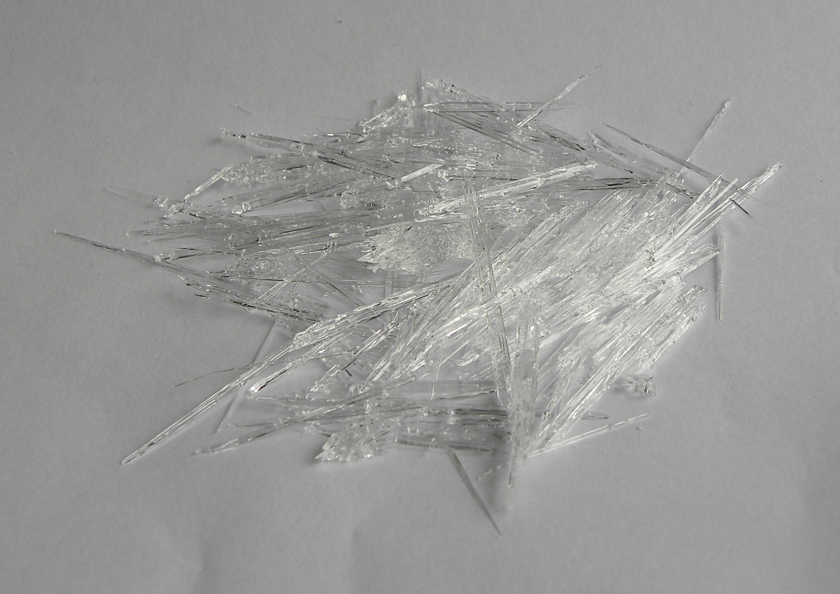 Kryształy fenolu w formie igieł